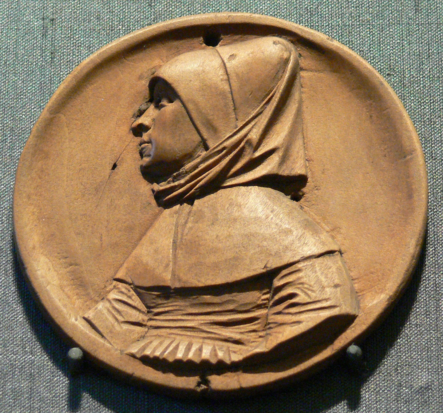 Bildnis einer Frau, nach Art des Hans Schwarz, Augsburg um 1520